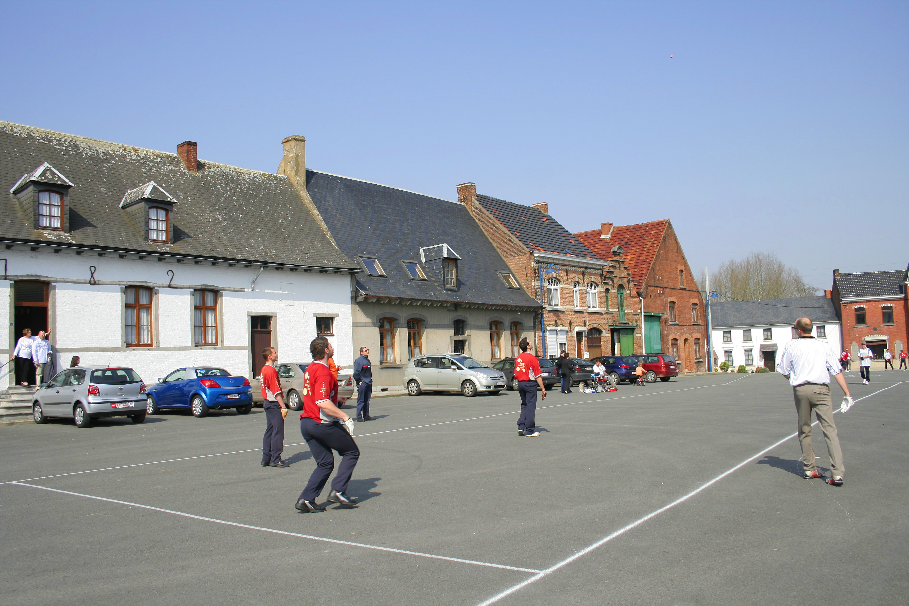 Hoves, jeu de balle pelotte, Place de Hoves.